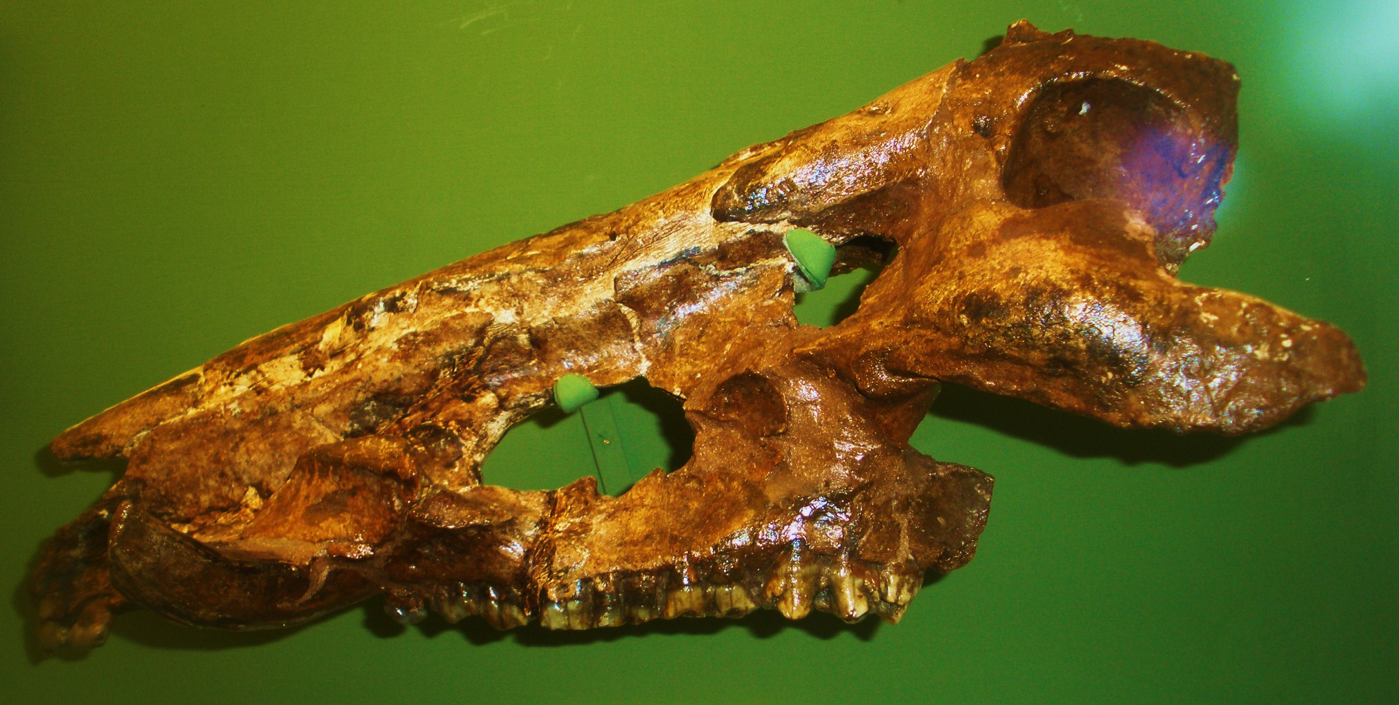 Fossil of Sus, an extinct mammal -- Topok the picture at Museo di Paleontologia di Firenze